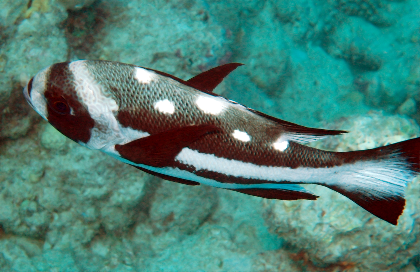 Macolor niger (juvenile)